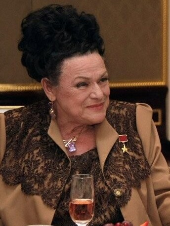 Людмила Зыкина на праздновании своего 80-летия